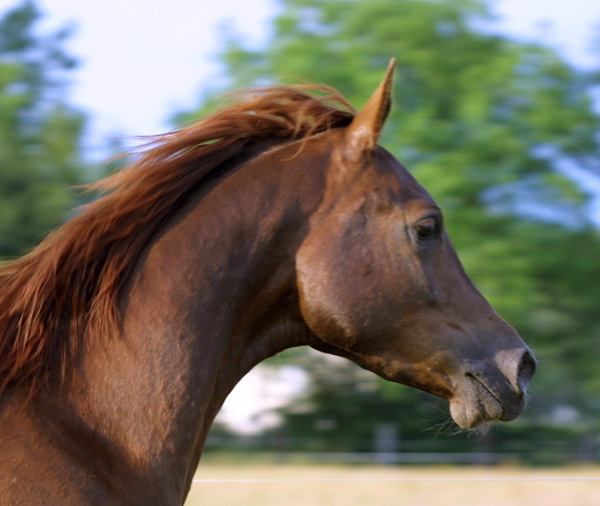 Kopfportrait von GH Kamsin